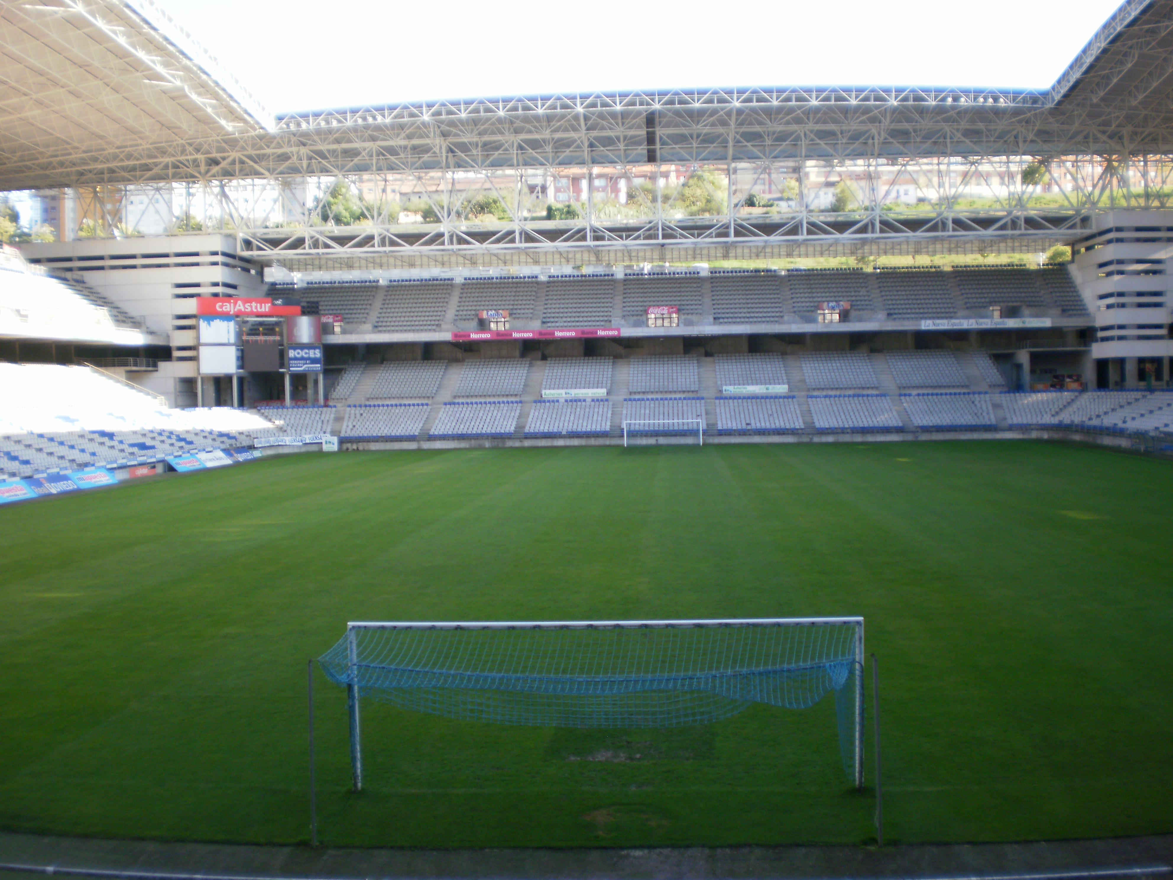 Interior del estadio Carlos Tartiere